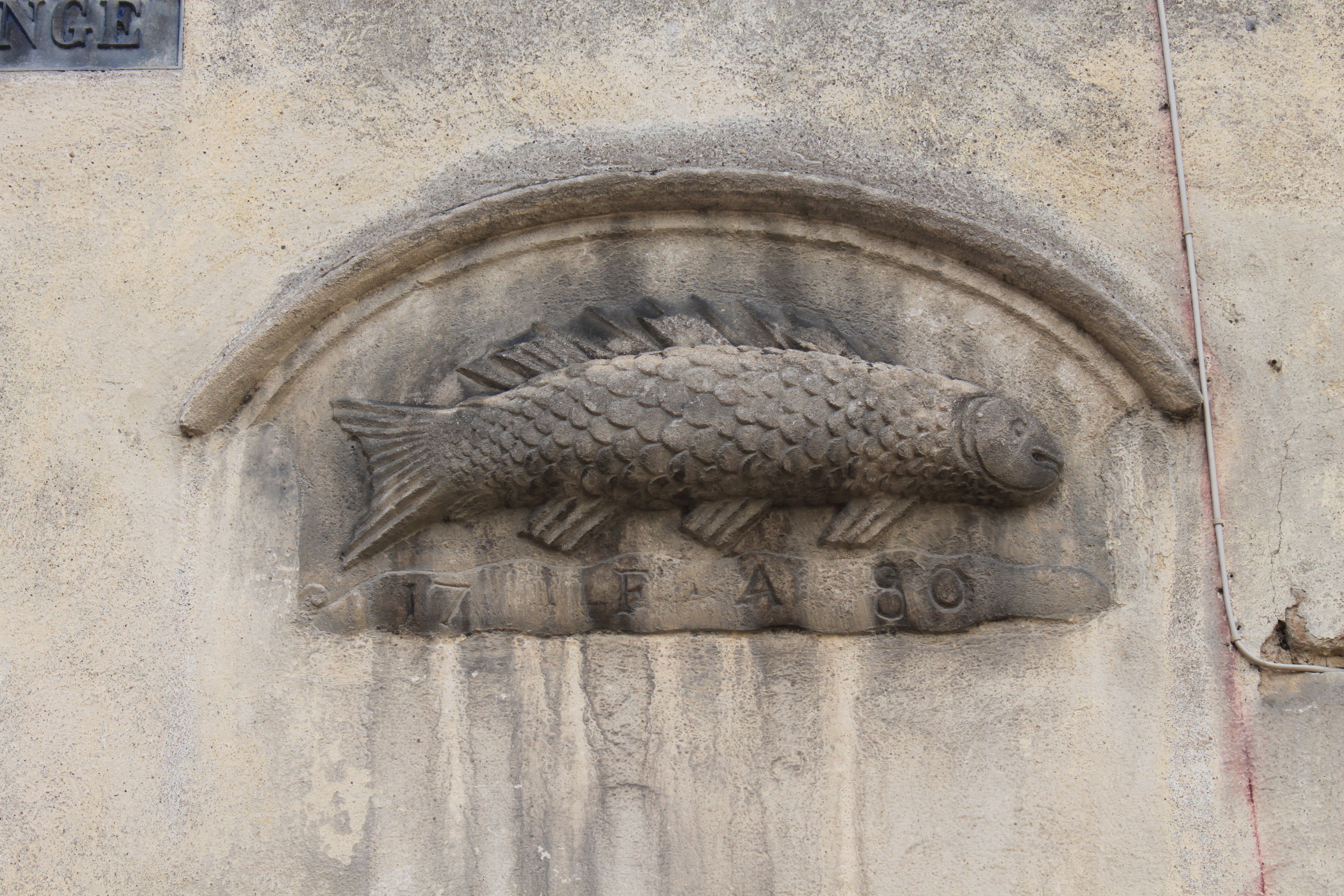 Nuits-Saint-Georges, Bourgogne, France